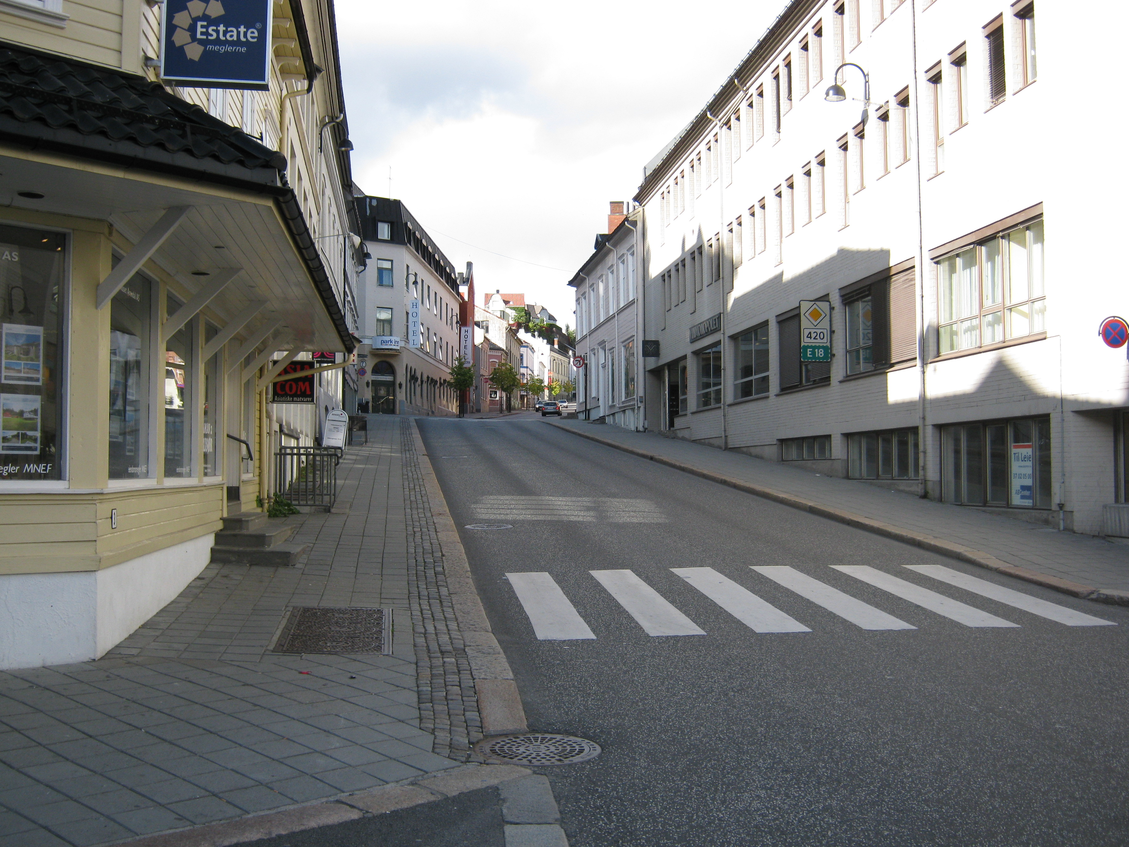 Vestregate i Arendal fra krysset Malmbryggen